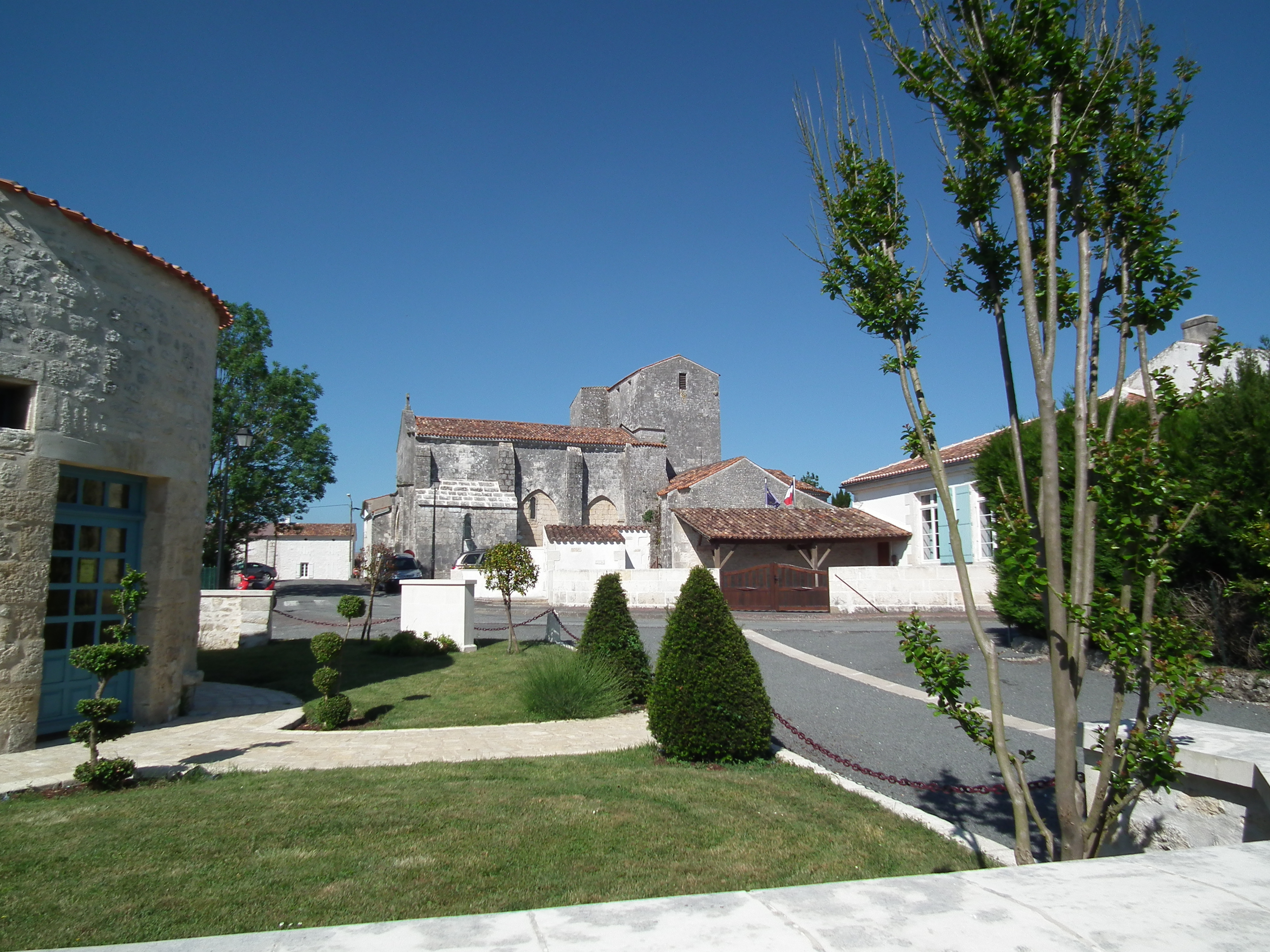 Le village de Soulignonne